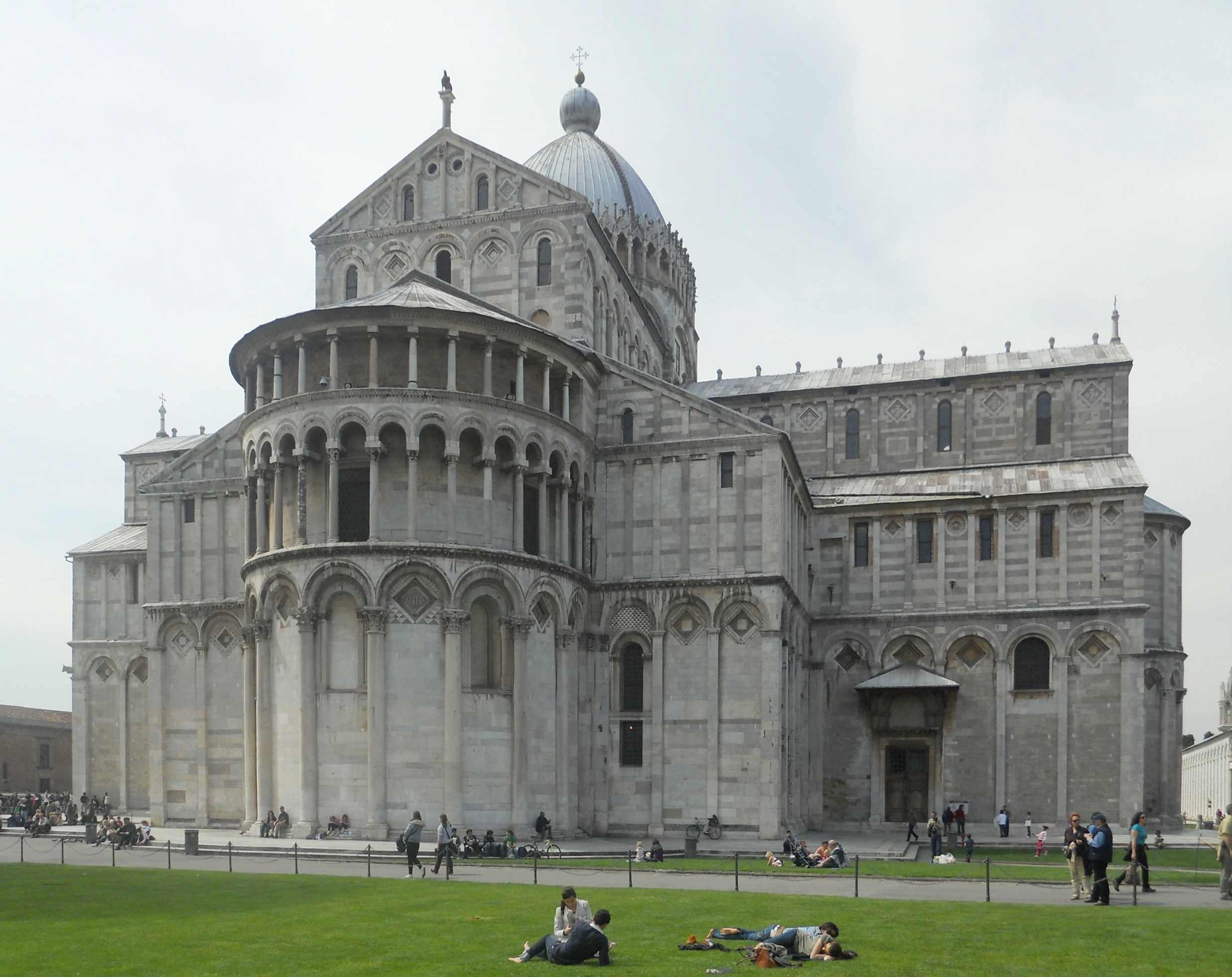 Piazza dei Miracoli